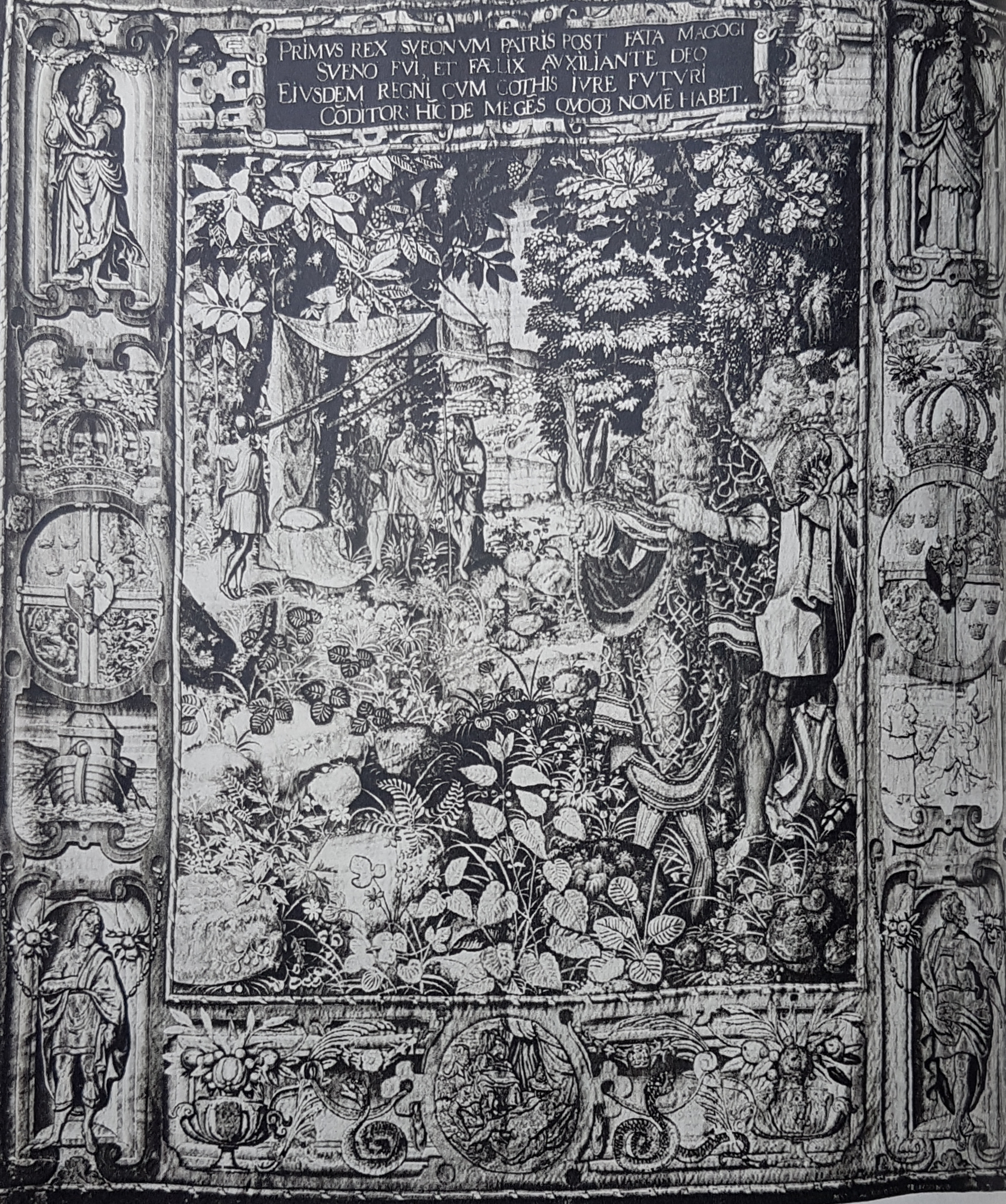 Sveno, vävd tapet ur den på 1500-talet tillkomna serien över Svenska sagokungar utförd av Nils Eskilsson. Tapeten finns på Stockholms slott. Avfotograferad bild från Allhems Svenskt konstnärslexikon.